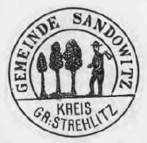 Altes Siegel des Ortes Sandowitz im Kreis Groß Strehlitz, Schlesien.